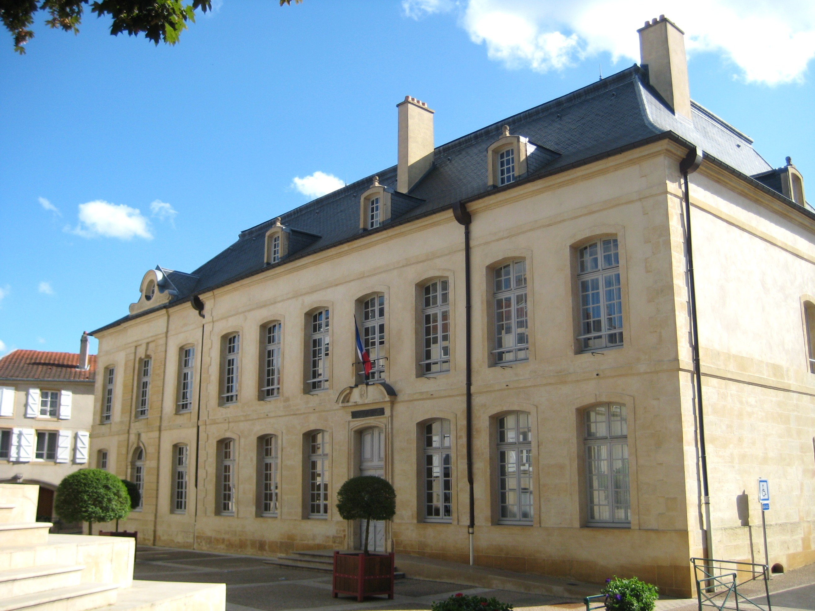 Description Mairie de BrieyDate 18 May 2009Source mon appareil photoAuthor Aimelaime Mairie de Briey